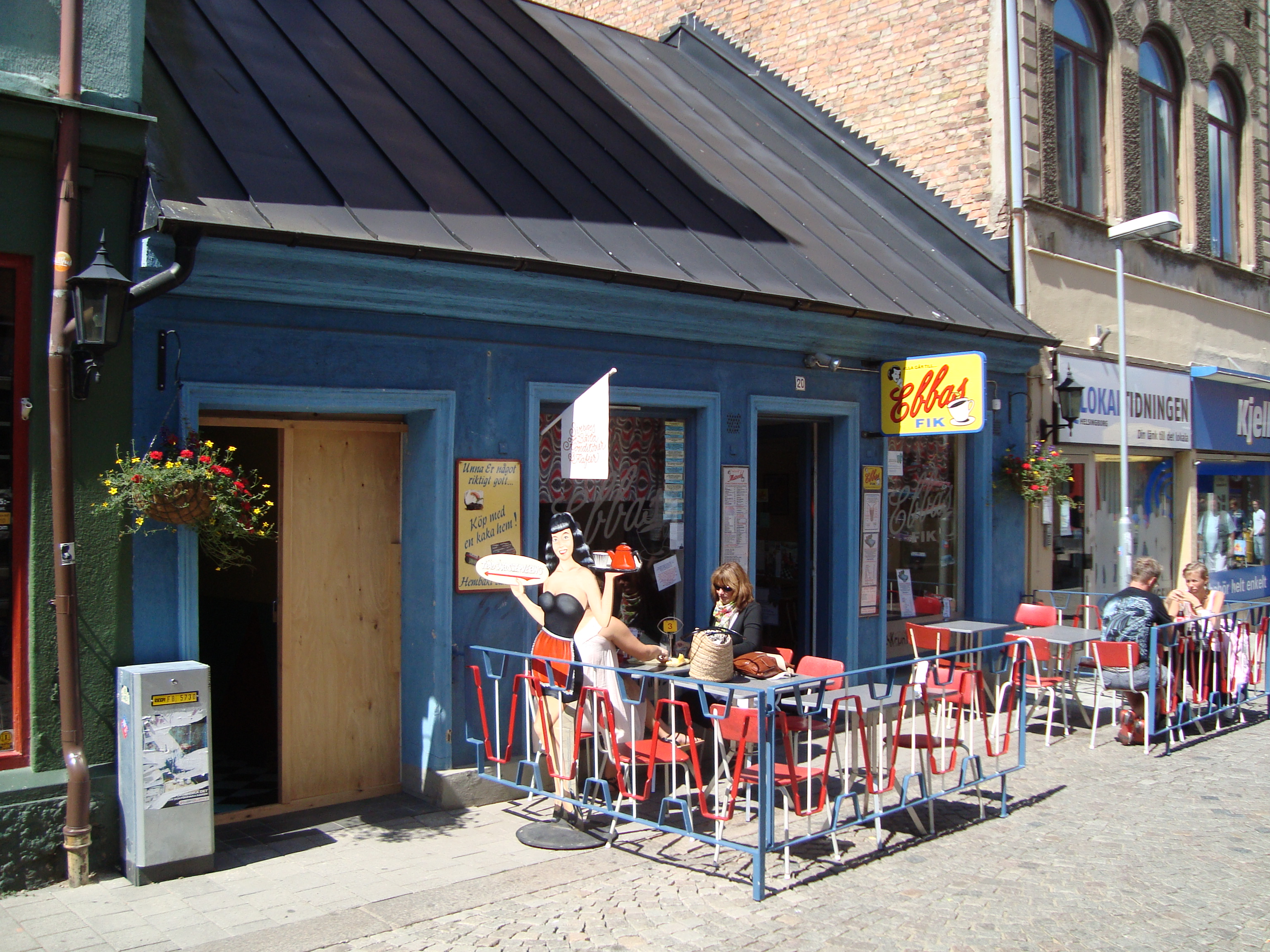 Det 1950-talsinspirerade kaféet Ebbas fik i Helsingborg.